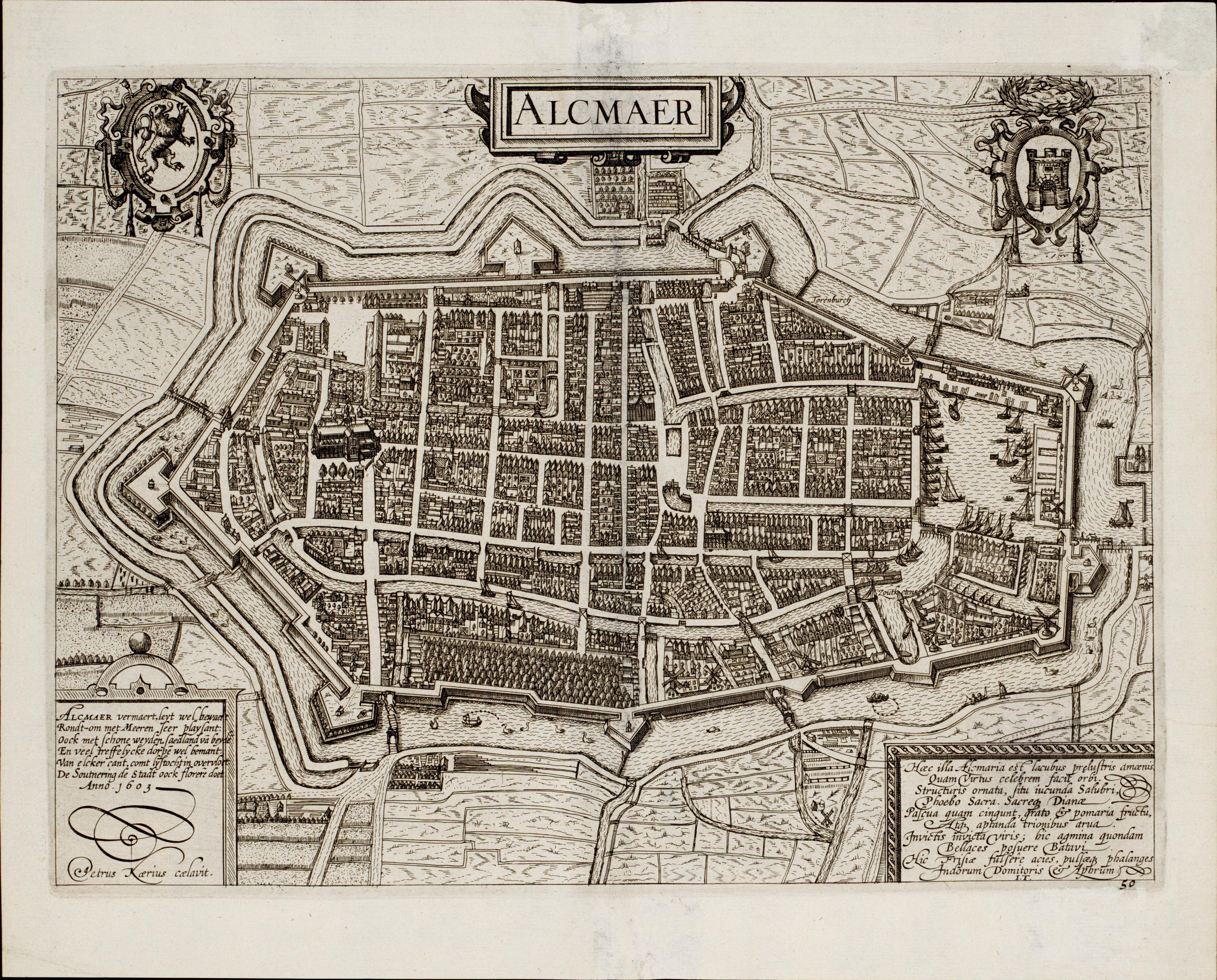 Plattegrond van Alkmaar